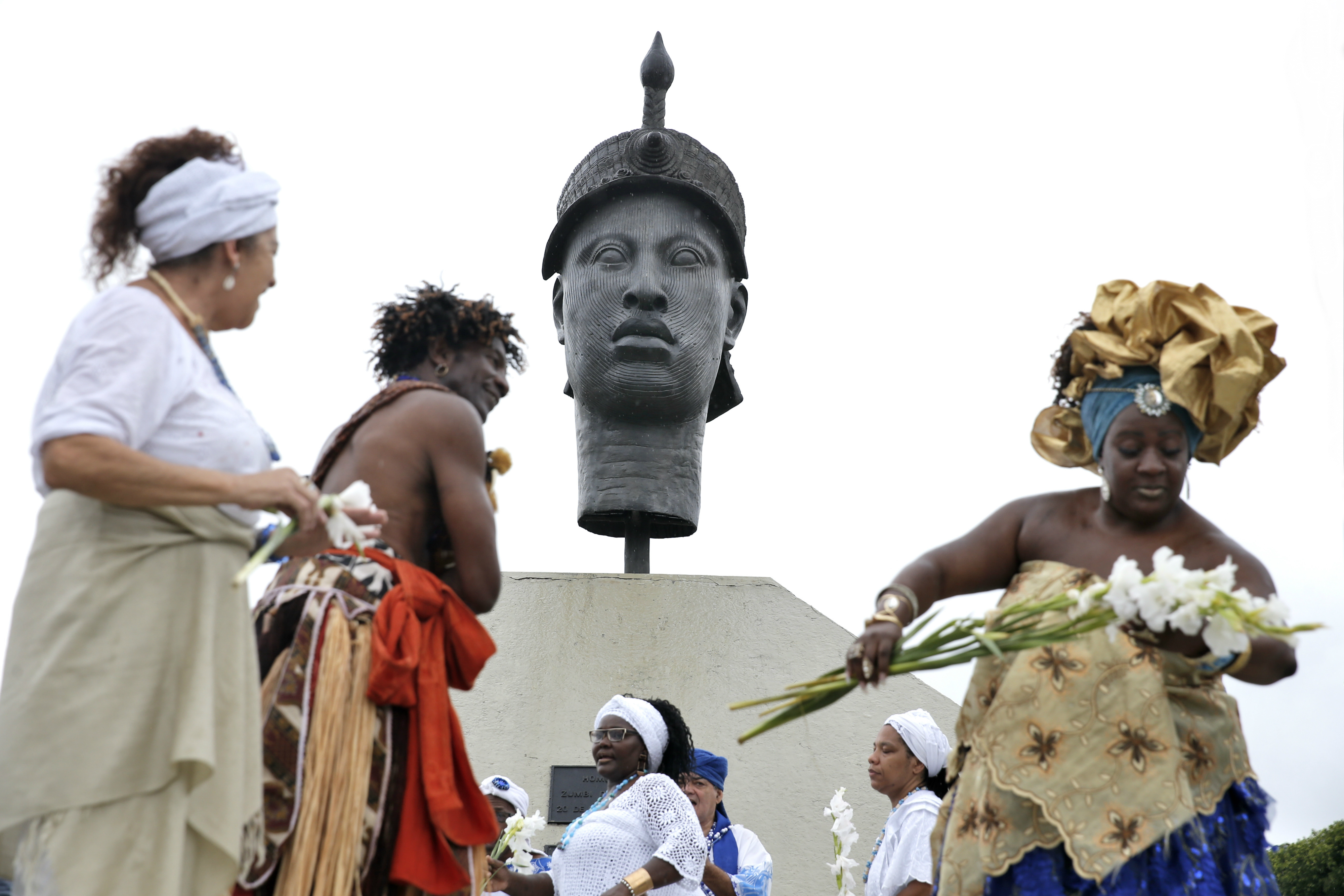 Rio de Janeiro - Em comemoração ao Dia da Consciência Negra, grupos fazem homenagens junto ao Monumento a Zumbi dos Palmares, na região central do Rio de Janeiro (Tânia Rêgo/Agência Brasil)